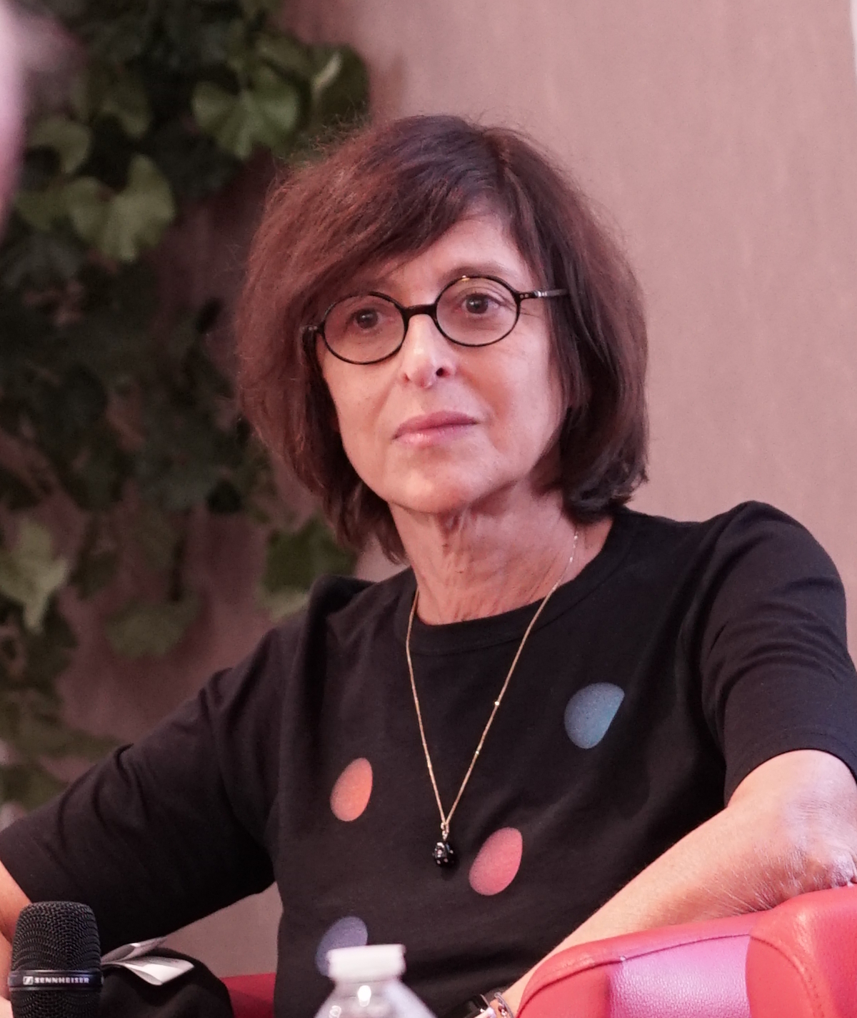 lors du livre sur la place.